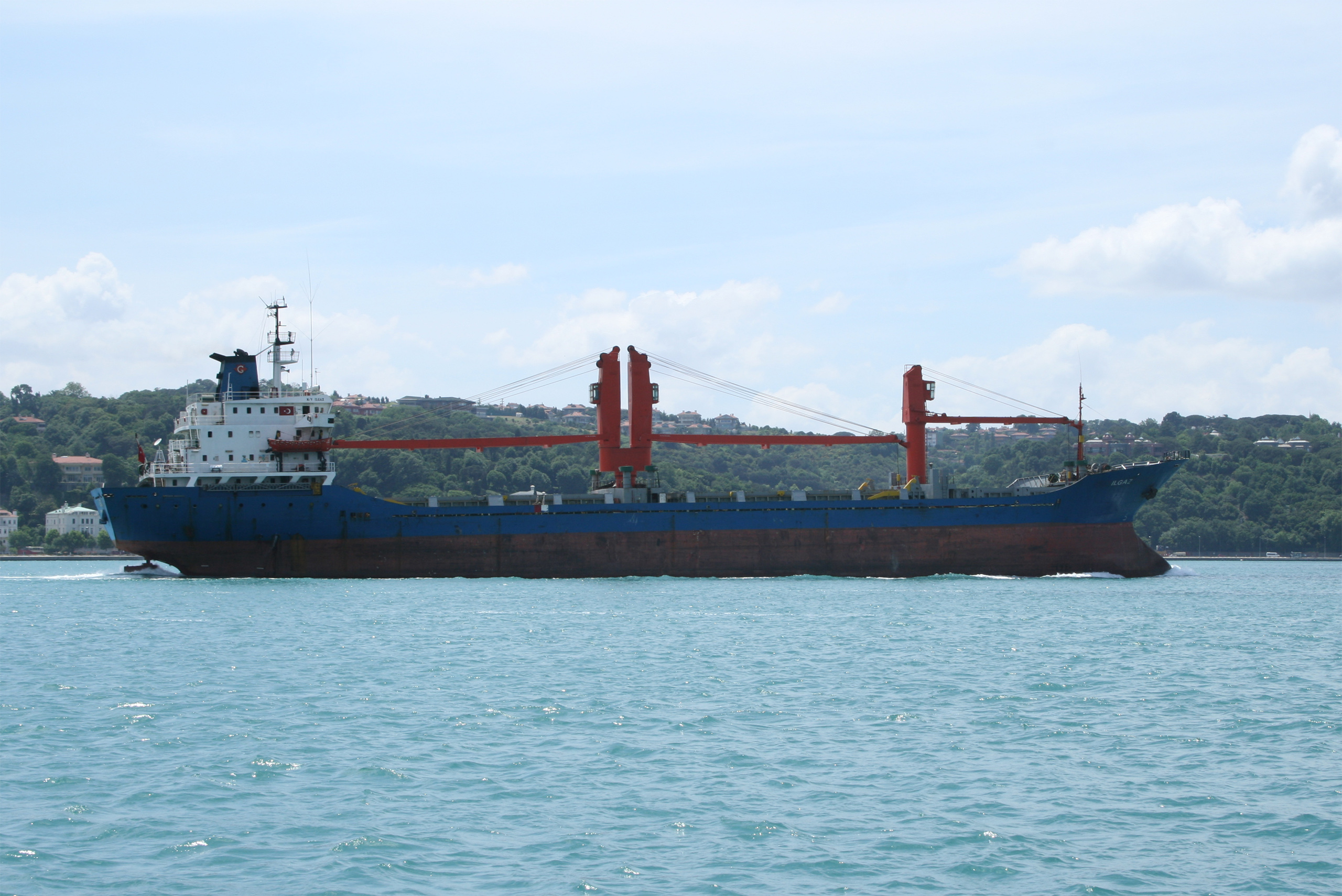 L'Ilgaz (IMO : 8516835) dans le Bosphore